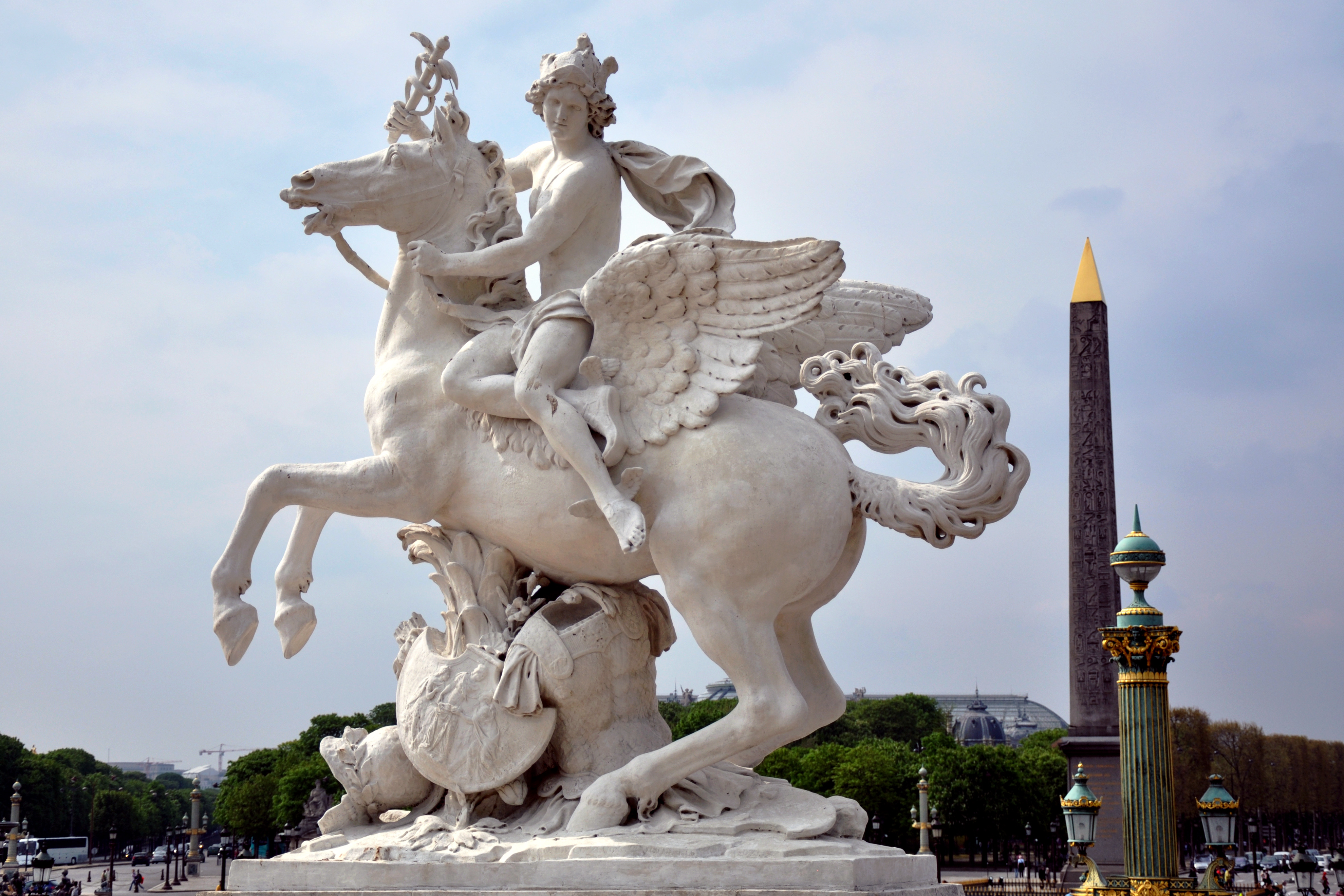 Mercure chevauchant Pégase, par Antoine Coysevox (1640-1720), copie ayant remplacé en 1986 le marbre original déplacé au Musée du Louvre ( pavillon Richelieu, cour Marly ). Jardin des Tuileries.